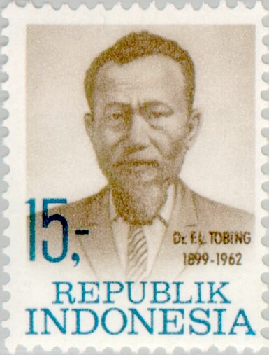 Ferdinand Lumbantobing